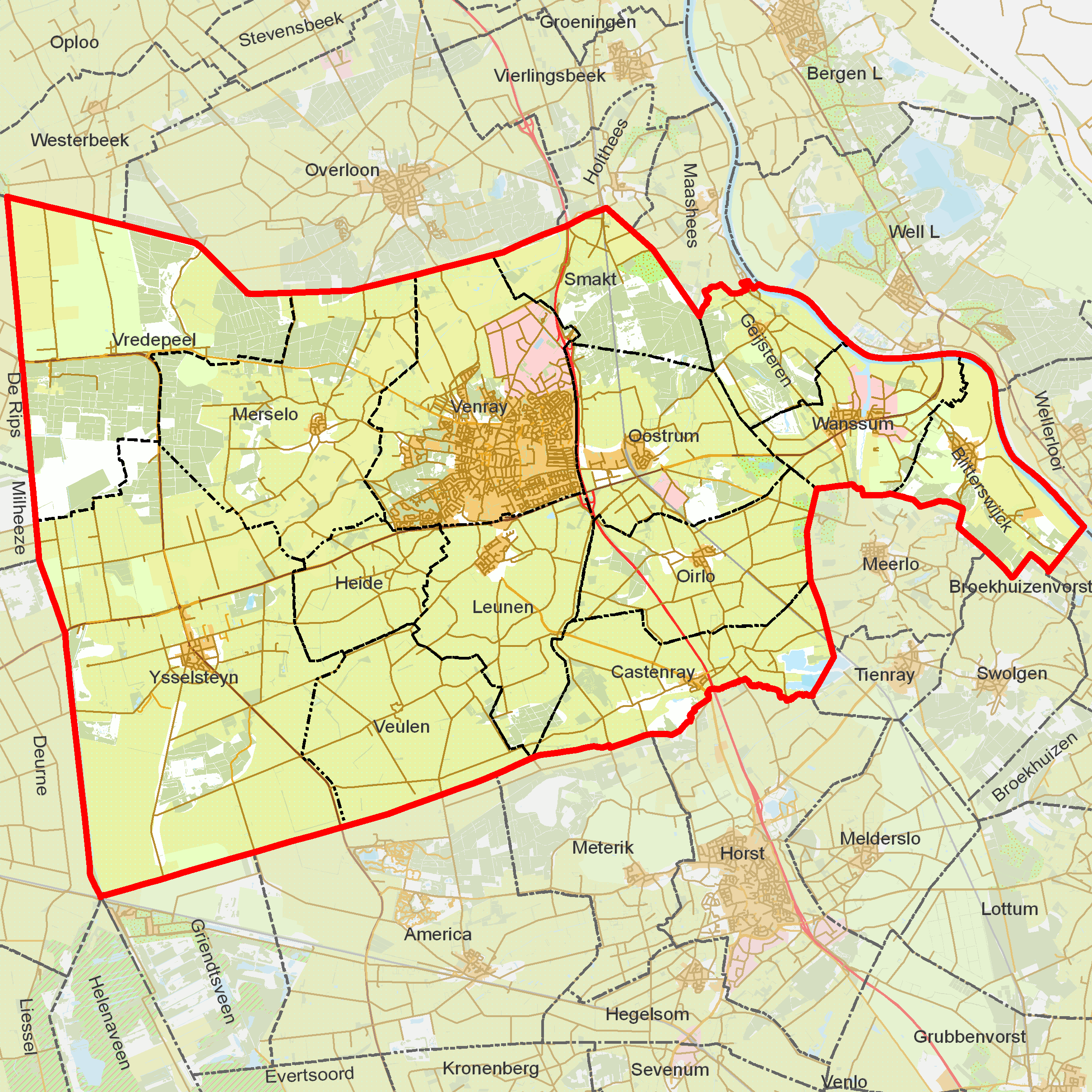 BAG woonplaatsen - Gemeente Venray.png